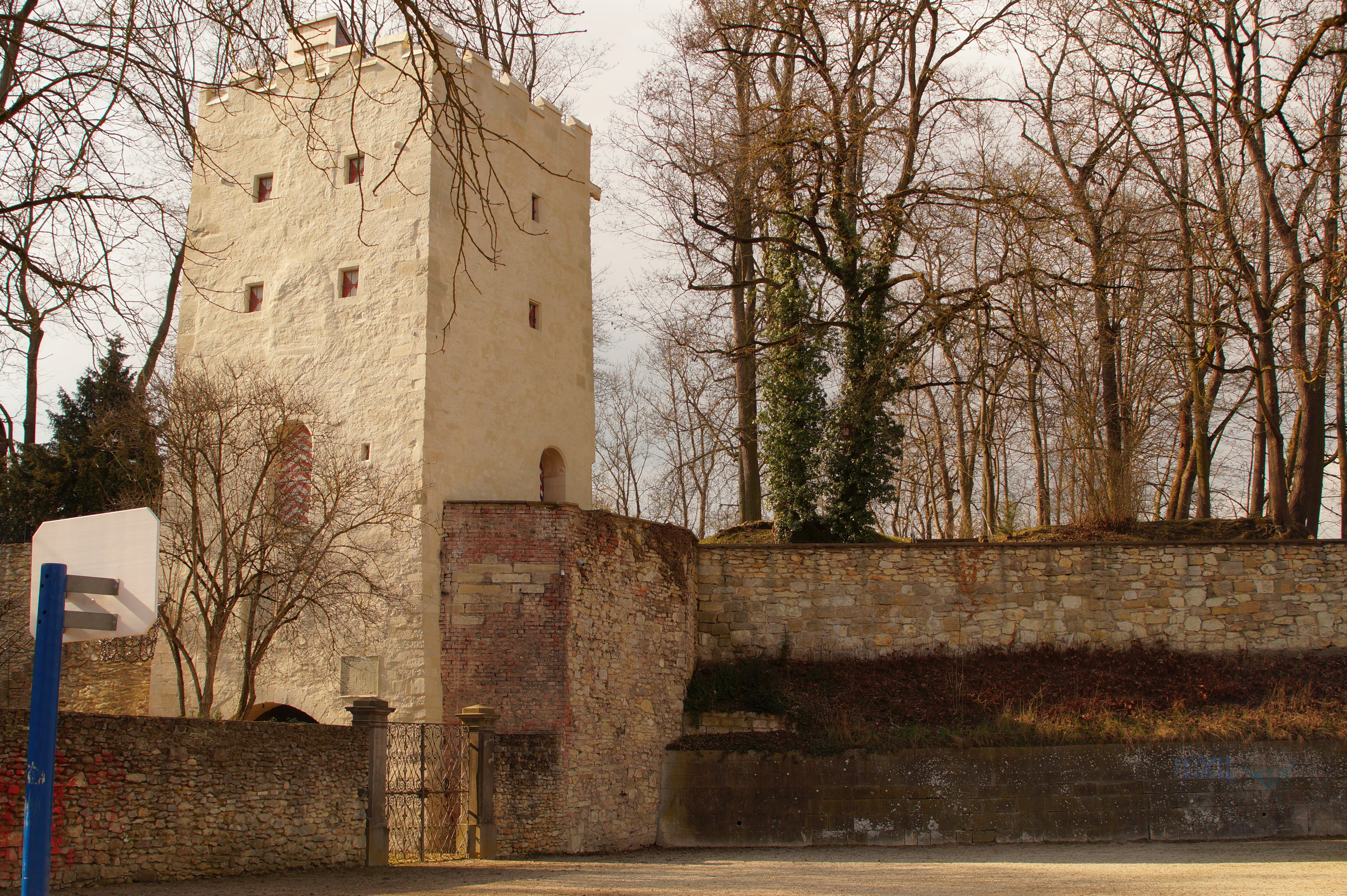 Regensburg